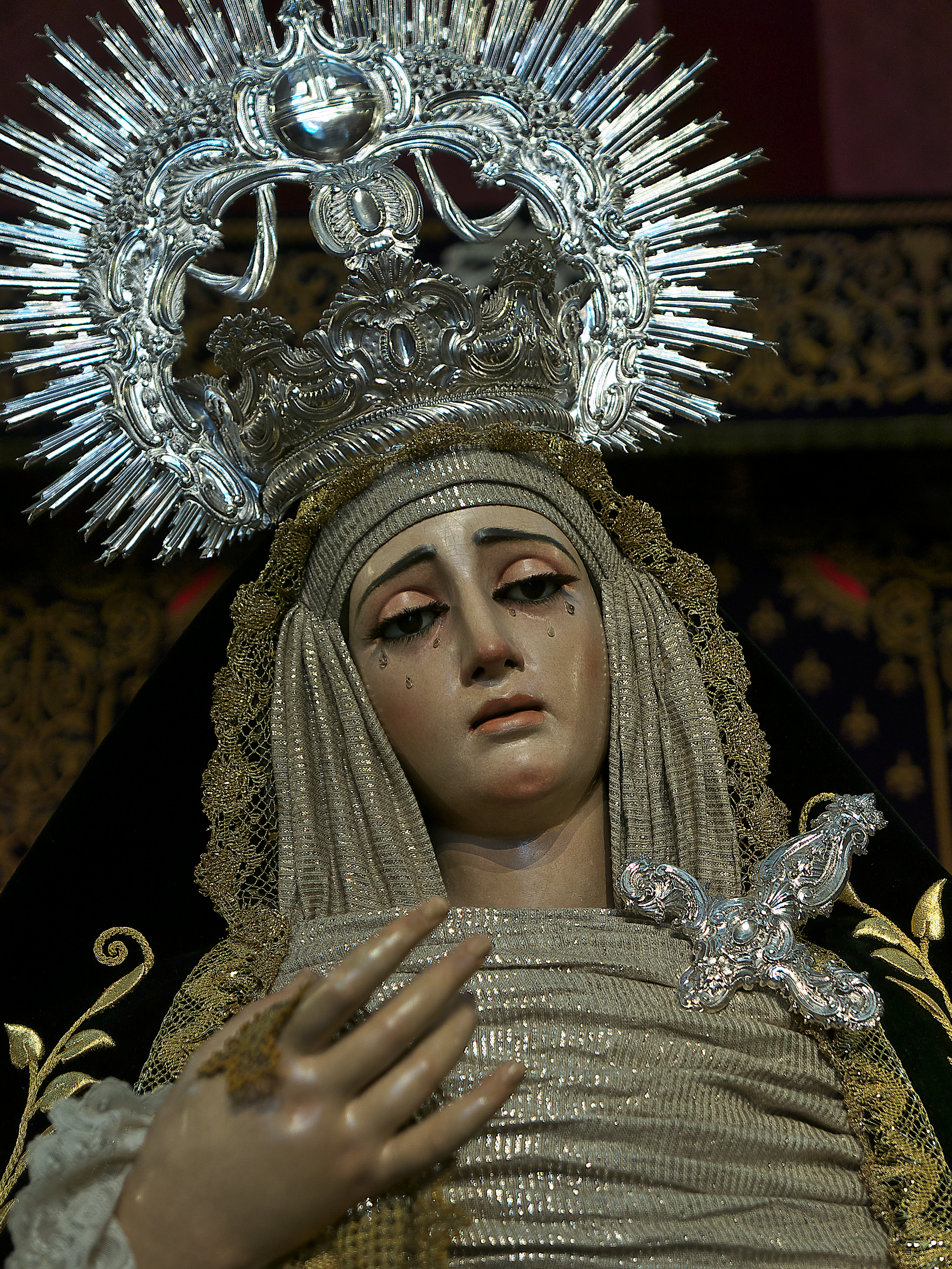 Imagen titular de la Real e Ilustre Hermandad y Cofradía de Nazarenos de la Sagrada Columna y Azotes de Nuestro Señor Jesucristo y María Santísima de la Victoria (Sevilla).